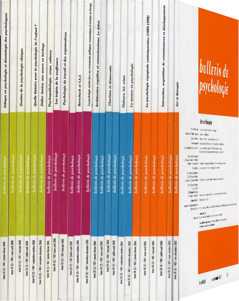 Collection bulletin de psychologie